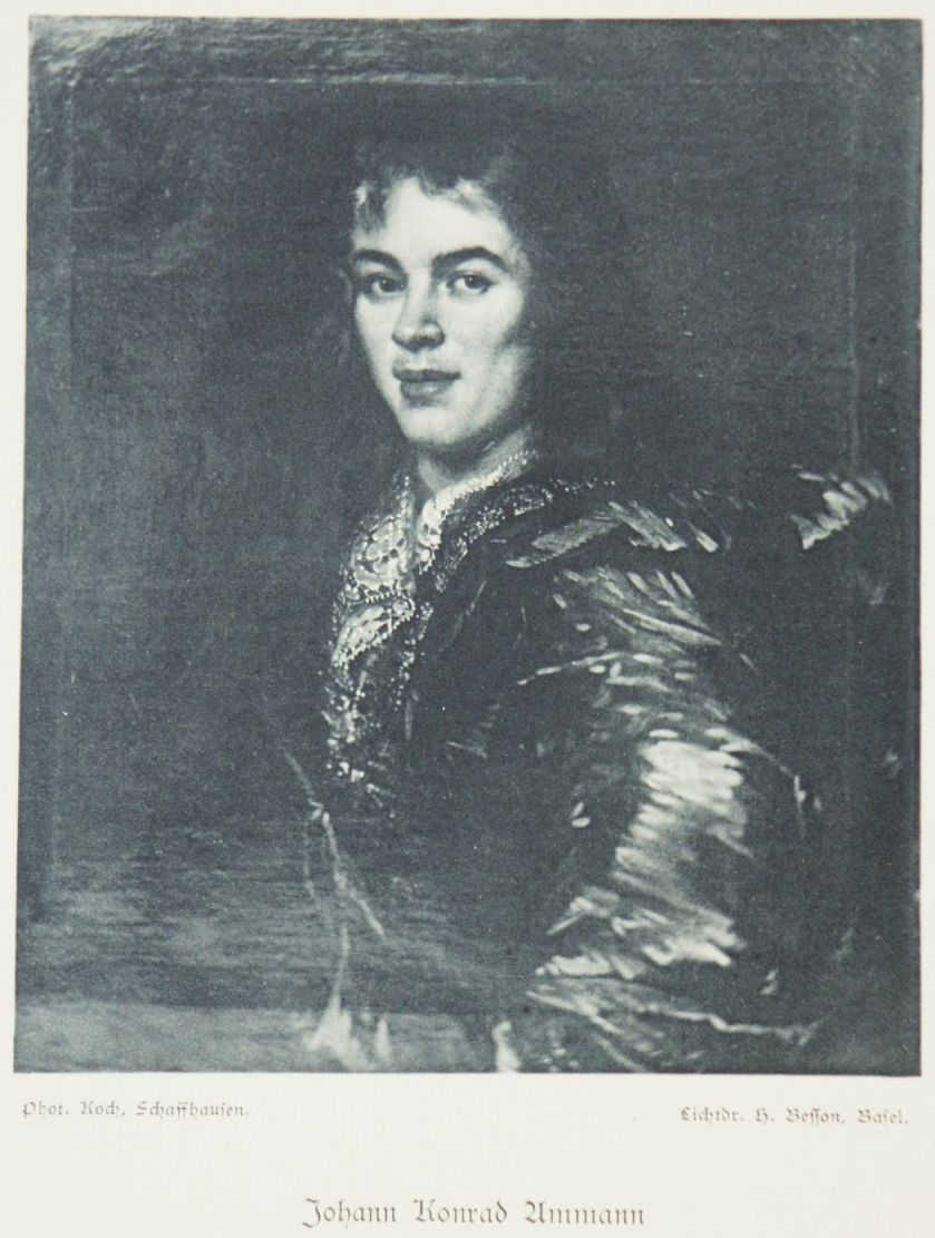 Johann Konrad Ammann 1669-1724, Portrait von Friedrich Wettstein, Museum zu Allerheiligen, Schaffhausen. Bild zerstört am 1. April 1944 durch Bomben amerikanischer Flugzeuge auf Schaffhausen.